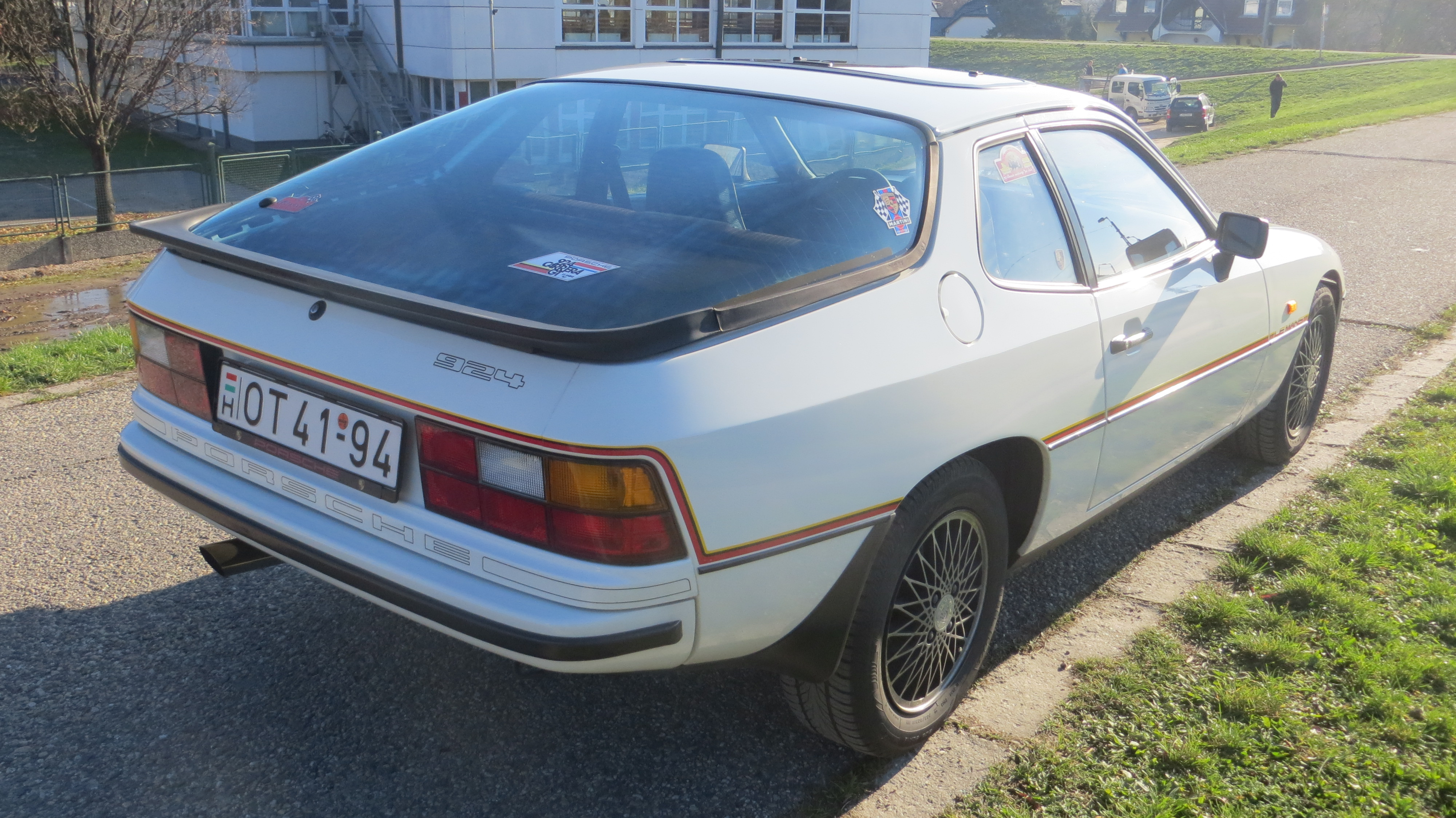 Ez a különleges modell a Porsche Le Mans-i 24 órás autóversenyeken elért hatalmas sikerei előtti tisztelgés. Összesen 1002 darab (más források szerint 1030) épült a modellből, mindegyik alpesifehér színben, körbefutó sárga-fekete-vörös díszítő csíkkal, az első sárvédőkön ugyanilyen színű Le Mans felirattal. A modellen a 924 Turbo hátsó spoilere van, 6J×15-ATS Turbo-Look keréktárcsák, belül csíkos „Nadelstreifen” kárpitozású Turbo ülések fehér szegéllyel, 36 cm átmérőjű négyküllős bőrkormány, bőr váltógomb, az ajtóküszöbön fekete alapon fehér 924 felirat. A gépkocsihoz többféle extrát is lehetett rendelni, elektromos ablakot, elektromosan állítható külső tükröket, hátsó ablaktörlőt, fényszórómosót, légkondicionálót és kivehető targatetőt is. Jobbkormányos kivitelben 100 darab készült.